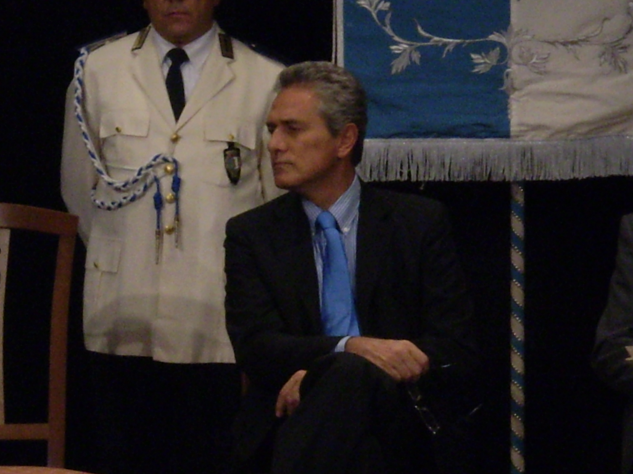 Francesco Rutelli a Rocca di Papa (Roma)